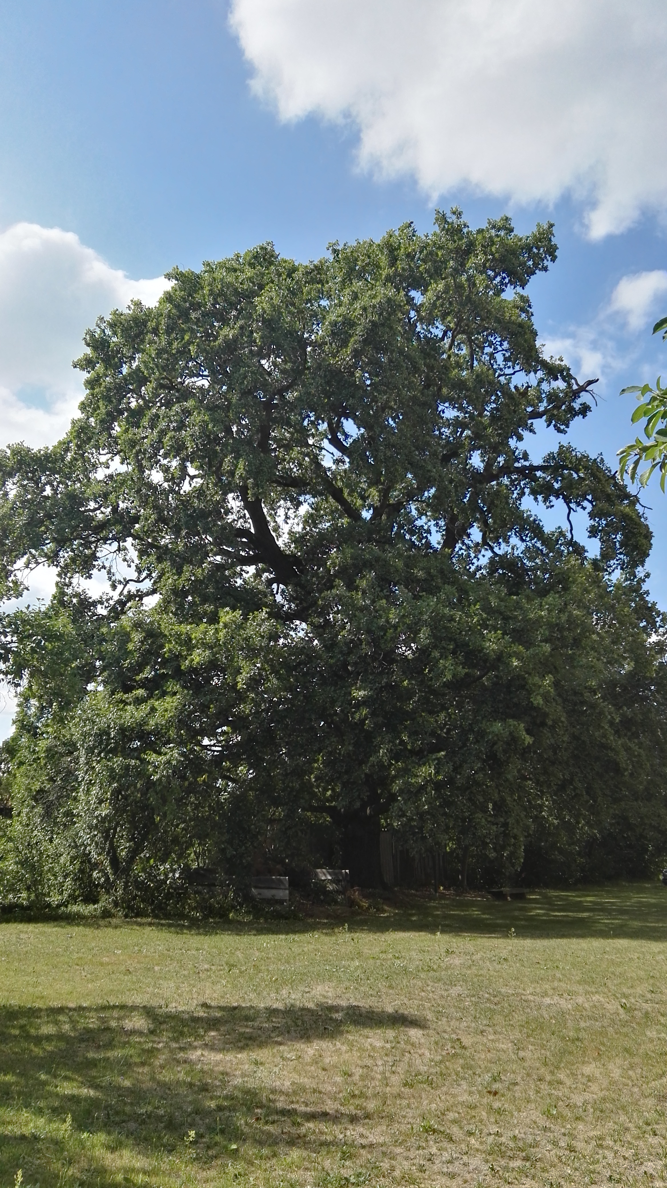 als Naturdenkmal (1108-6) geschützte Stieleiche auf dem Kirchhof in Kroppen, westlich der Kirche